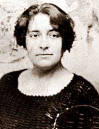 Lola Iturbe de son vrai nom Dolores Iturbe, né le 1er août 1902 à Barcelone et morte le 5 janvier 1990 à Gijon, est une anarcho-syndicaliste et féministe libertaire. Militante de la Confédération nationale du travail (Espagne), elle est parmi les fondatrices de mouvement féministe Mujeres Libres et participe activement à la Révolution sociale espagnole de 1936 ainsi qu'à la Résistance intérieure française.